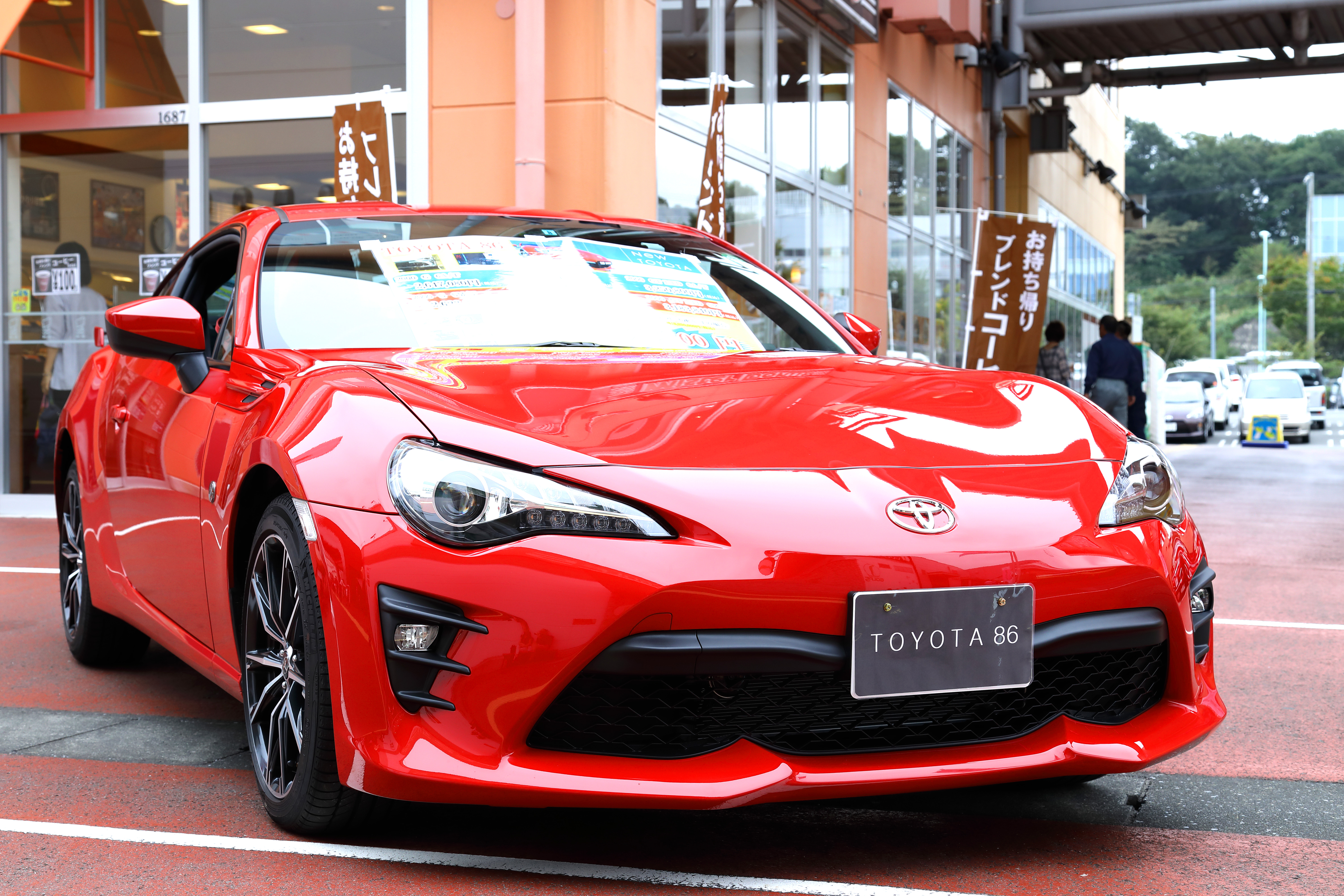 トヨタ・86のマイナーチェンジモデル（2016年～）